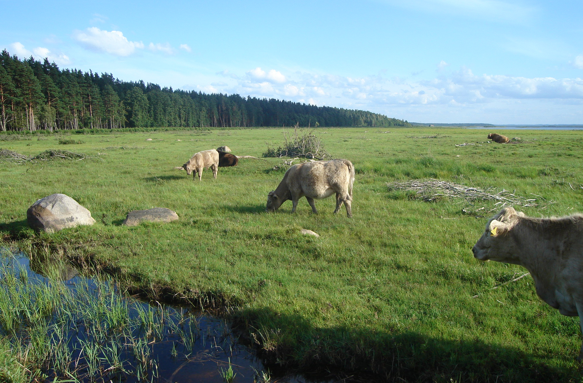 govis